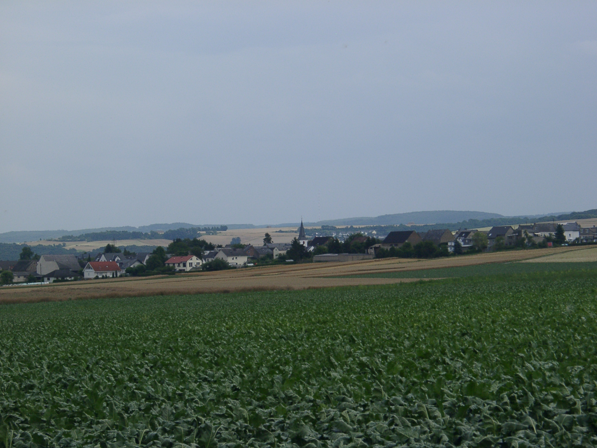 Gappenach (MYK)